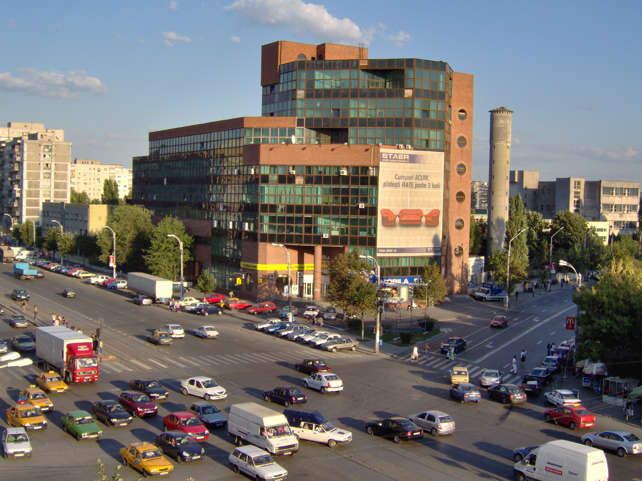 Cartierul Pantelimon